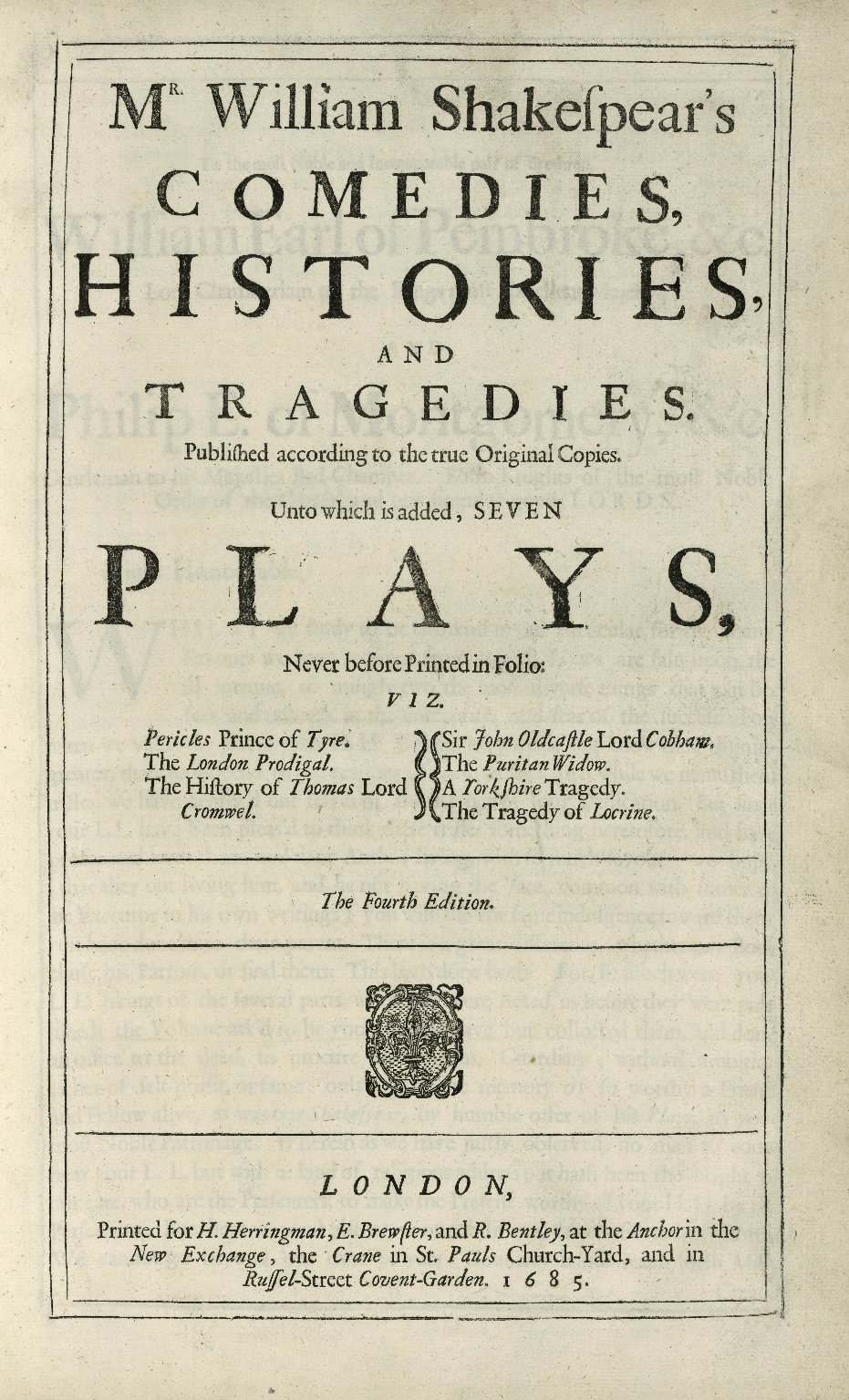 Титульный лист Четвёртого Фолио